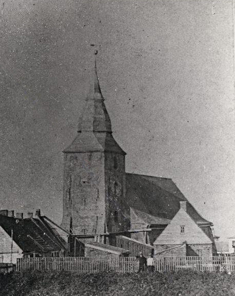 Foto der 1945 zerstörten St.Nicolai-Kirche auf Helgoland, Der abgebildete Turm wurde 1878 abgerissen. Das Bild ist also sicher älter als 134 Jahre